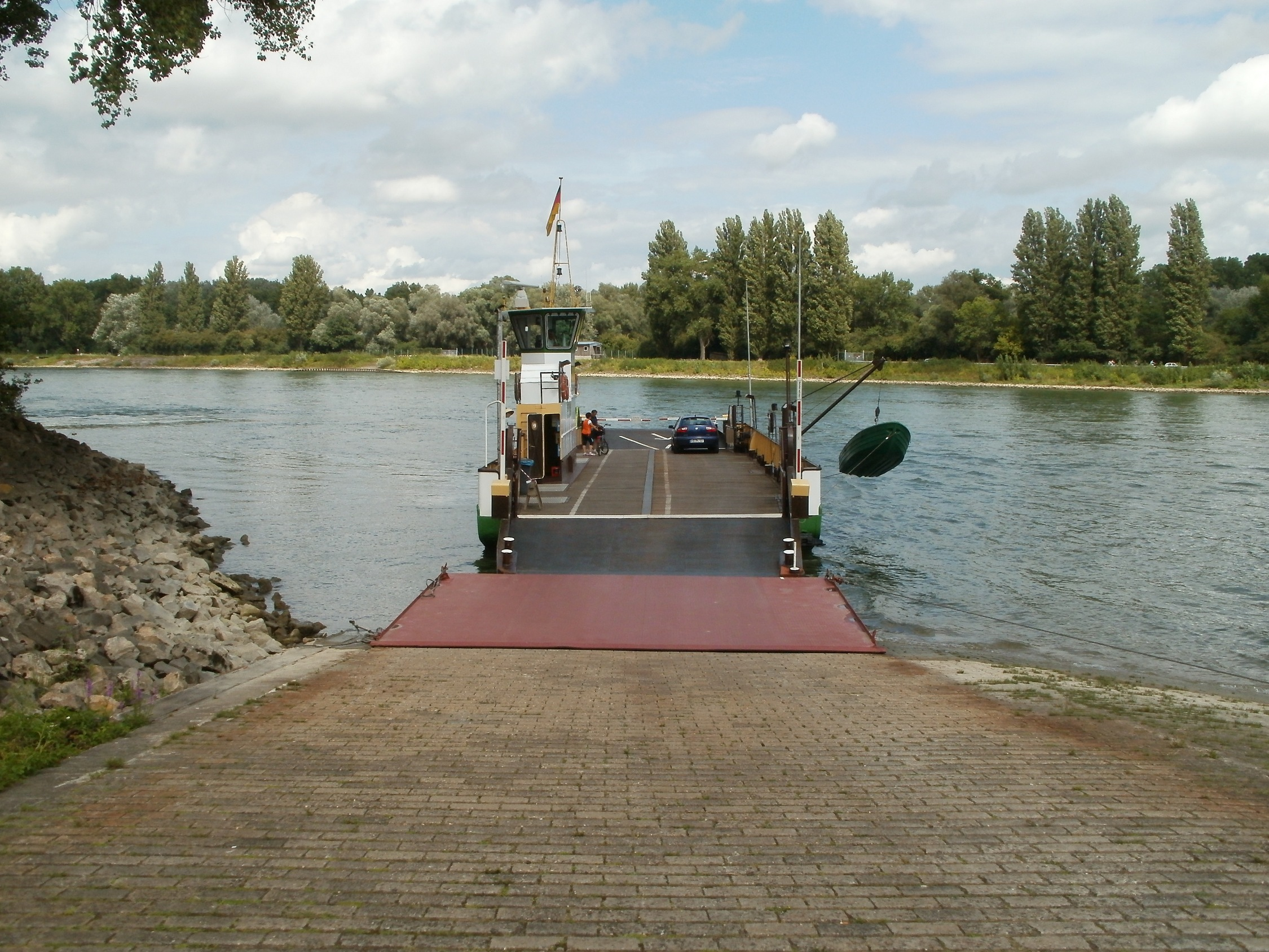 Kollerfähre